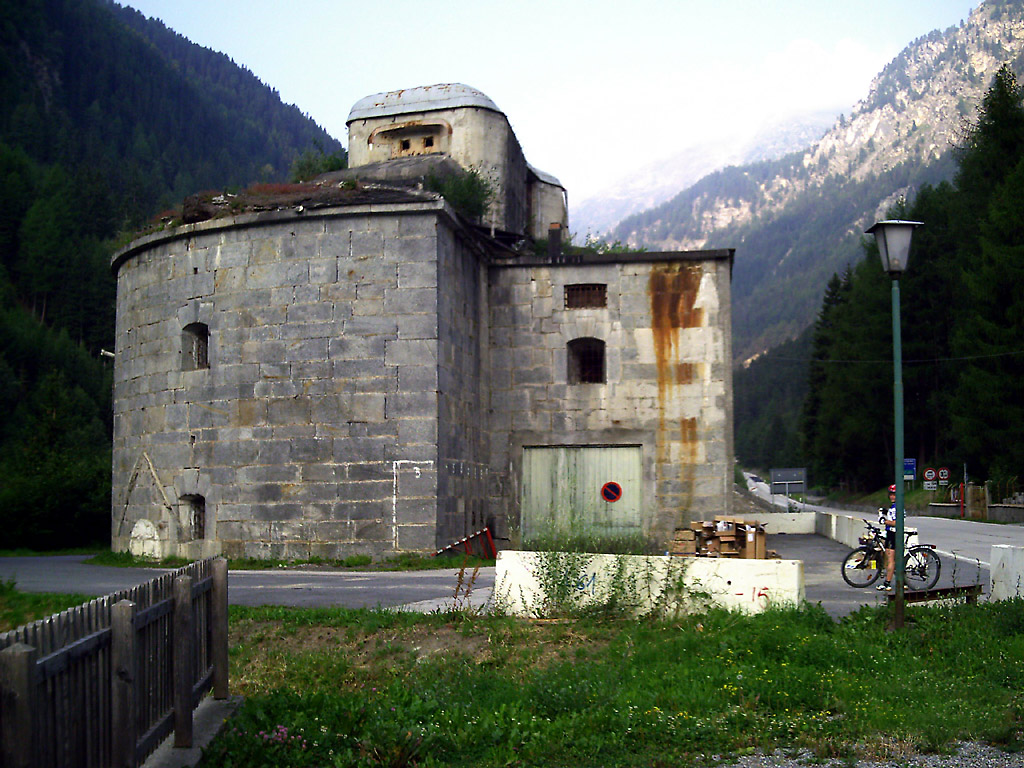 Österreichische Bunkeranlage in Gomagoi vom 1. Weltkrieg